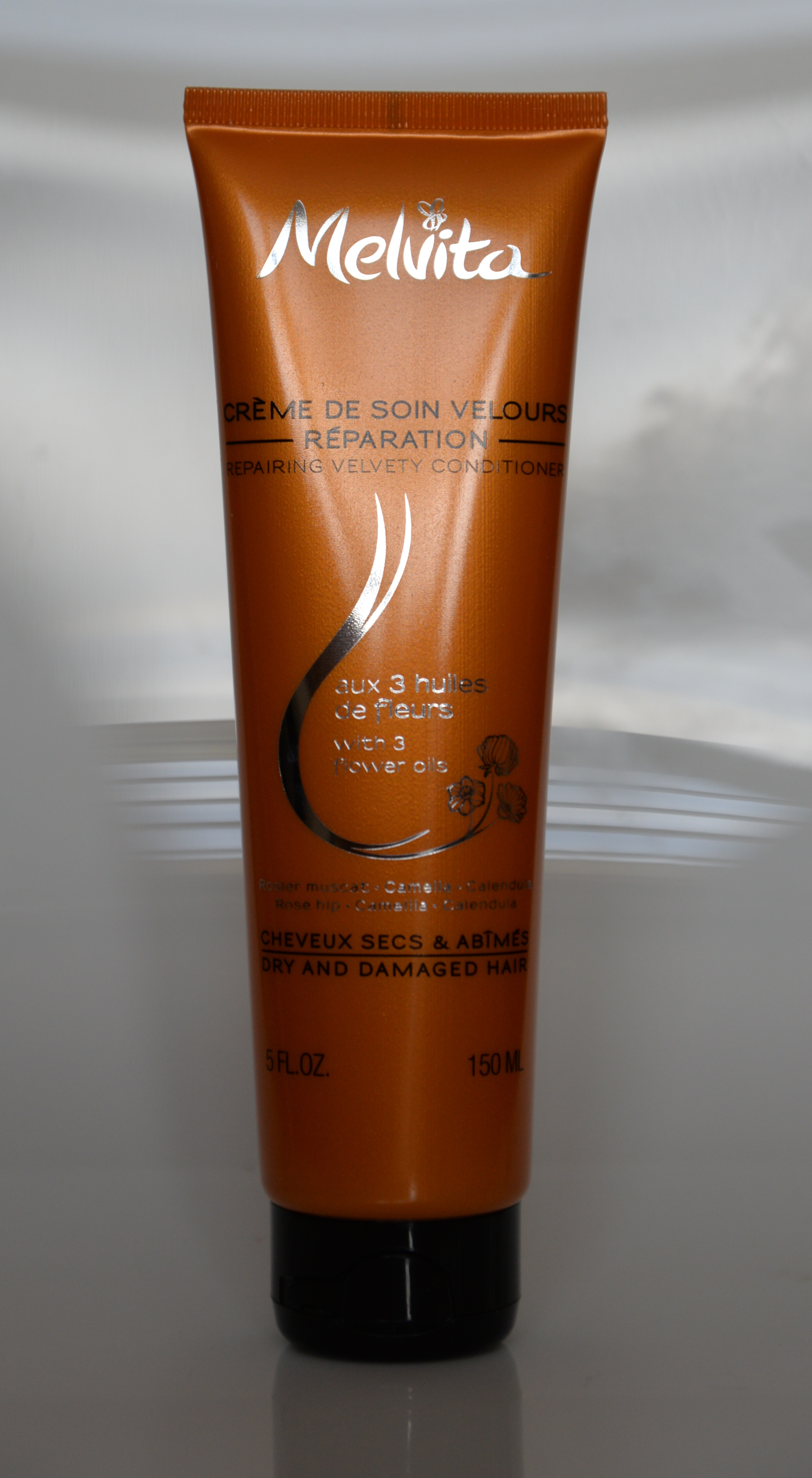 Crème de soin velours, réparation de cheveux secs et abîmés.